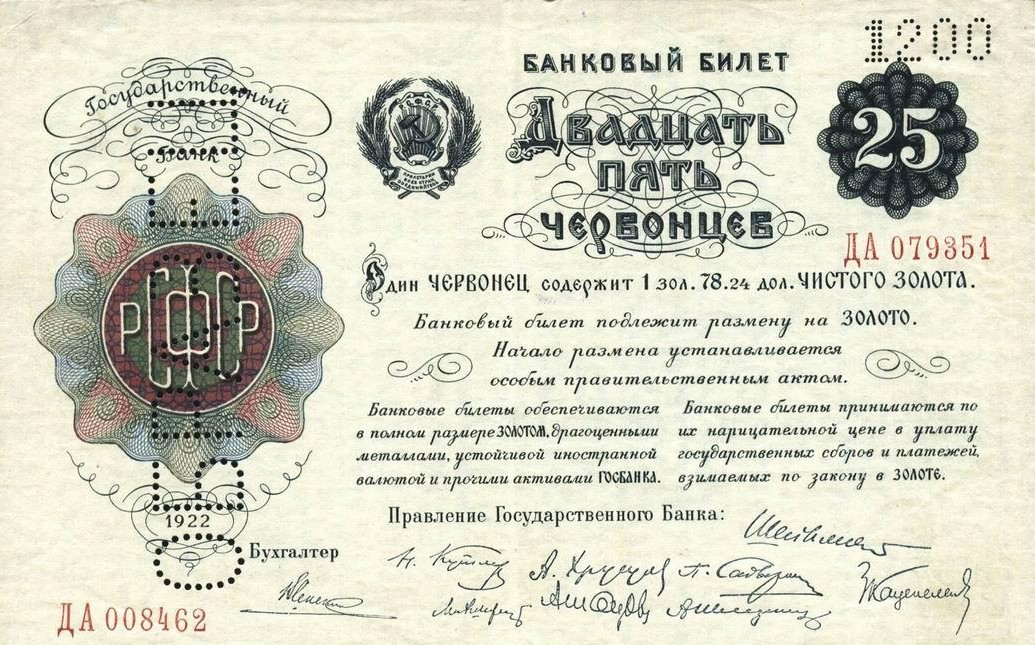 25 Червонцев 1922. РСФСР. Аверс. Односторонняя купюра. Подписи членов правления Государственного банка РСФСР. Содержала 215 г золота.